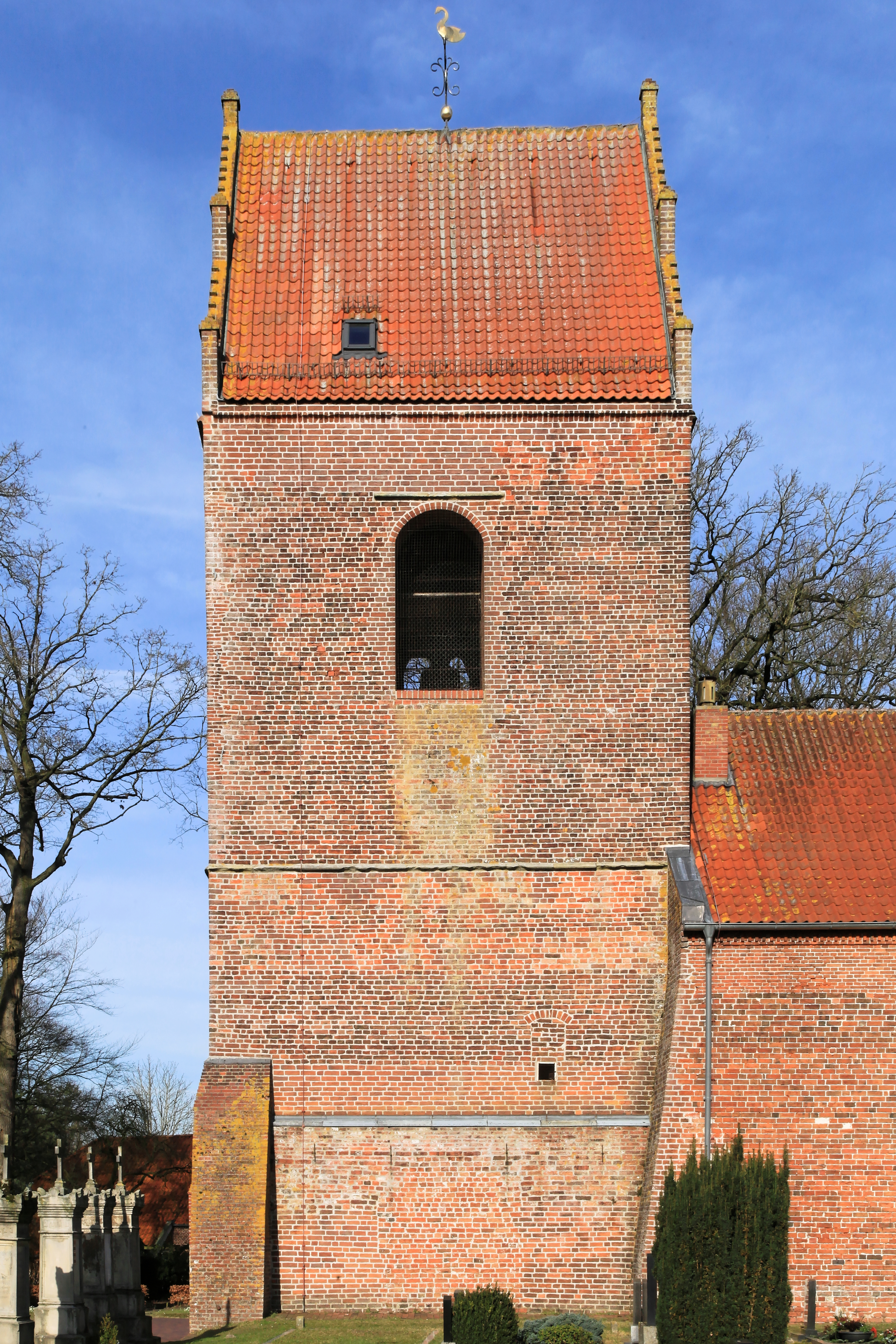 Kirche St. Laurentius und St.Vincentius, Groot Karkweg in Rhauderfehn